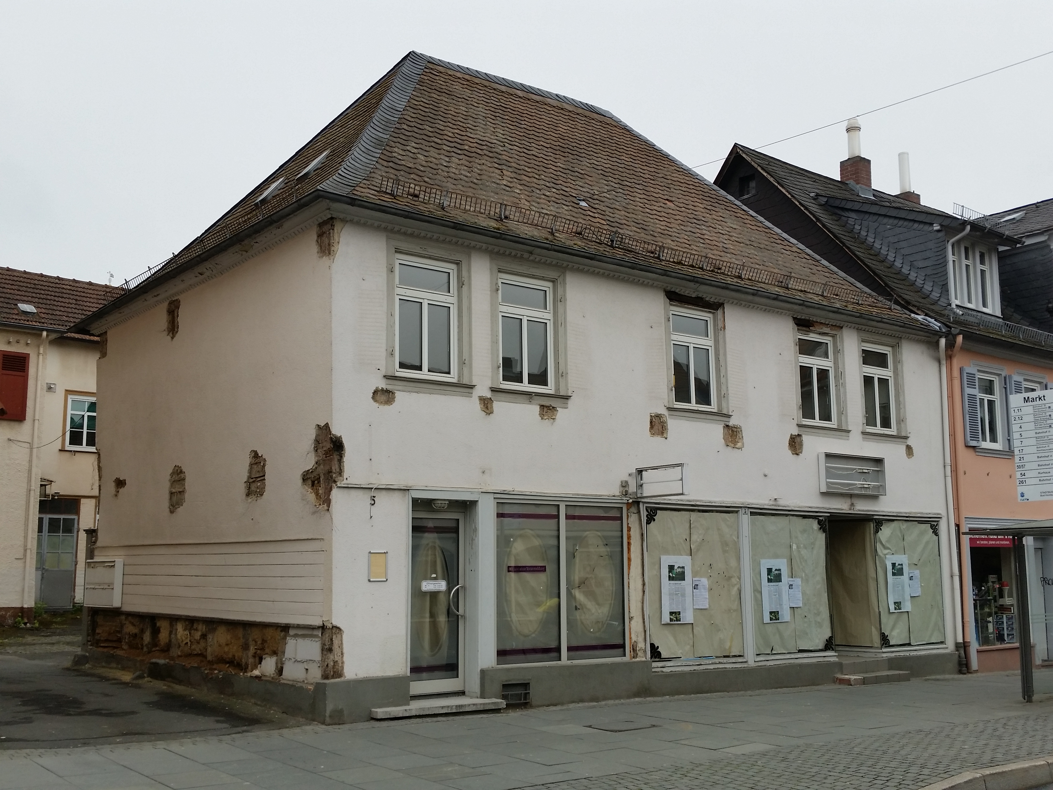 Zustand des Denkmals im Mai 2015